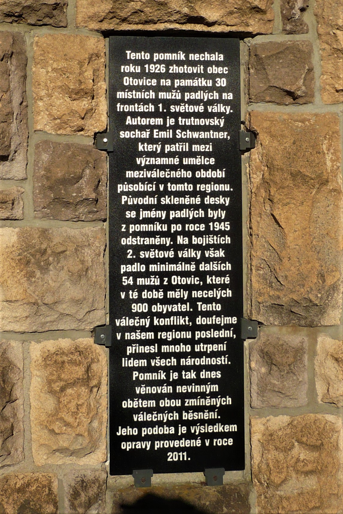 Otovice. Pomnik